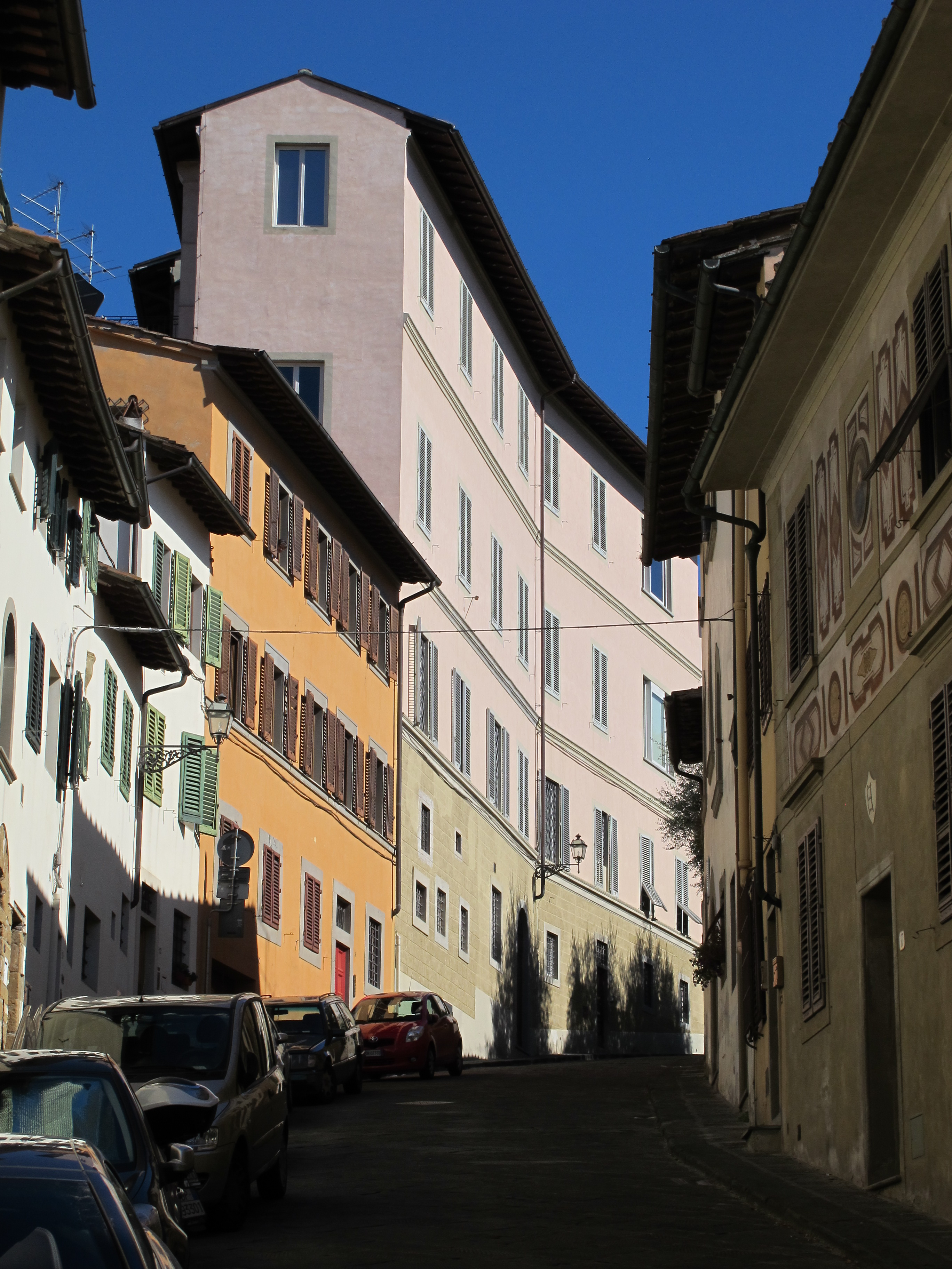 Costa San Giorgio, Firenze